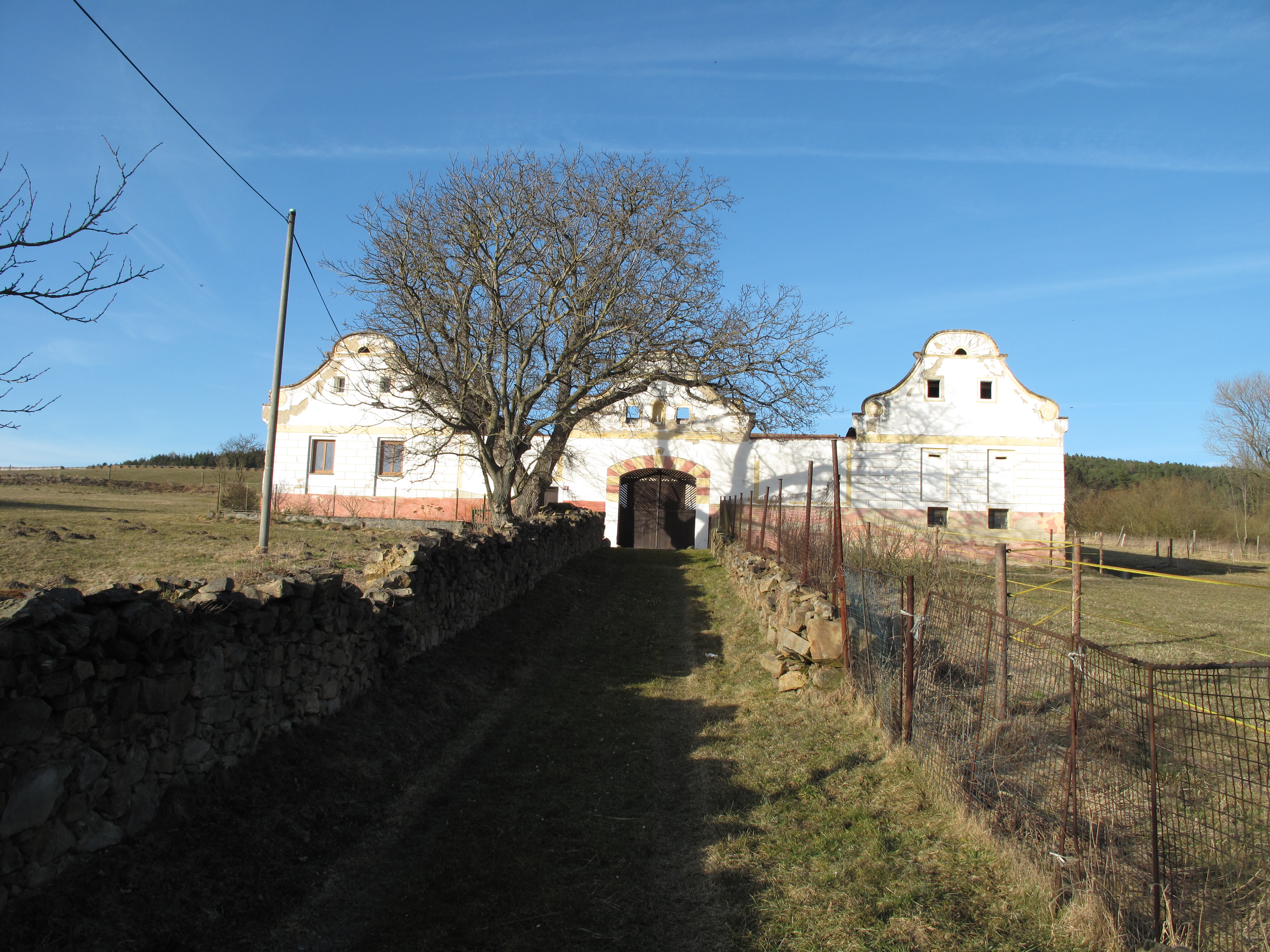 Statek čp. 12 v Radějovicích. Okres Strakonice, Česká republika.